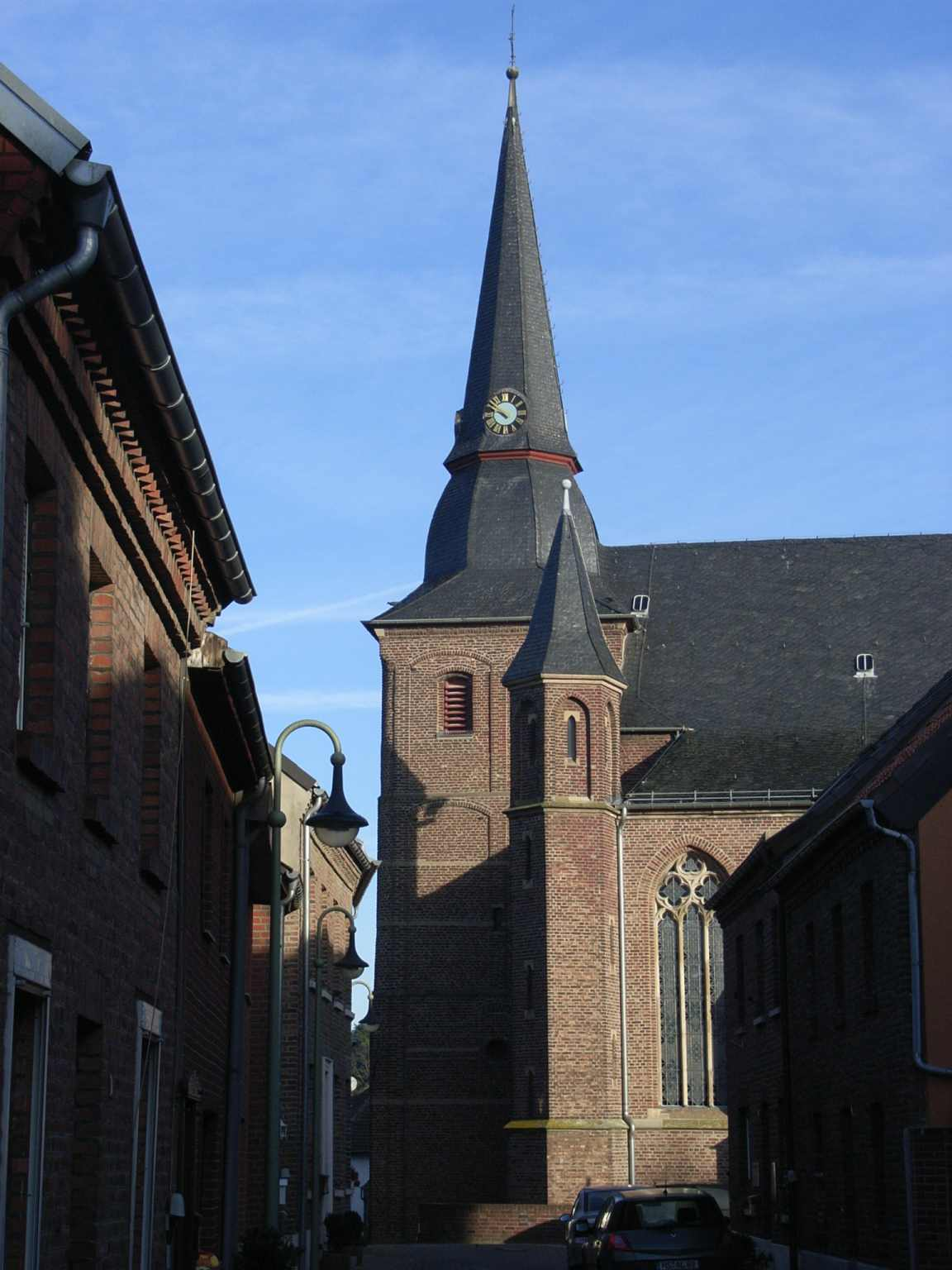 kath.Kirche Pauli Bekehrung, Erkelenz-Lövenich, NRW